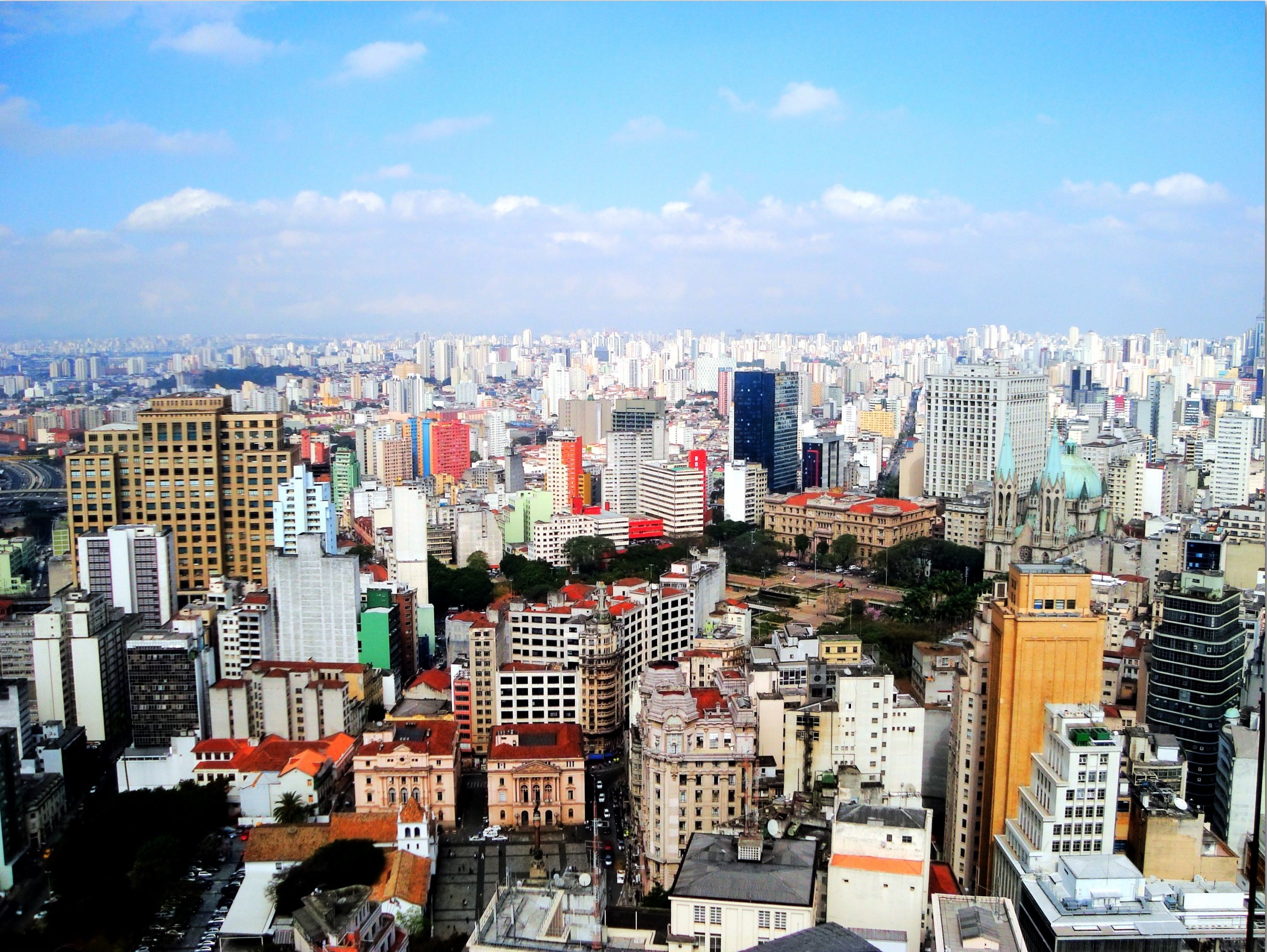 Vista do centro da cidade de São Paulo a partir do Edifício Altino Arantes, Brasil. Camera: DSC-W110 License on Flickr (2010-12-27): CC-BY-SA-2.0 Flickr tags: São Paulo, Sony DSC-W110, Rafael Acorsi, Banespa, Landscape, Paisagem